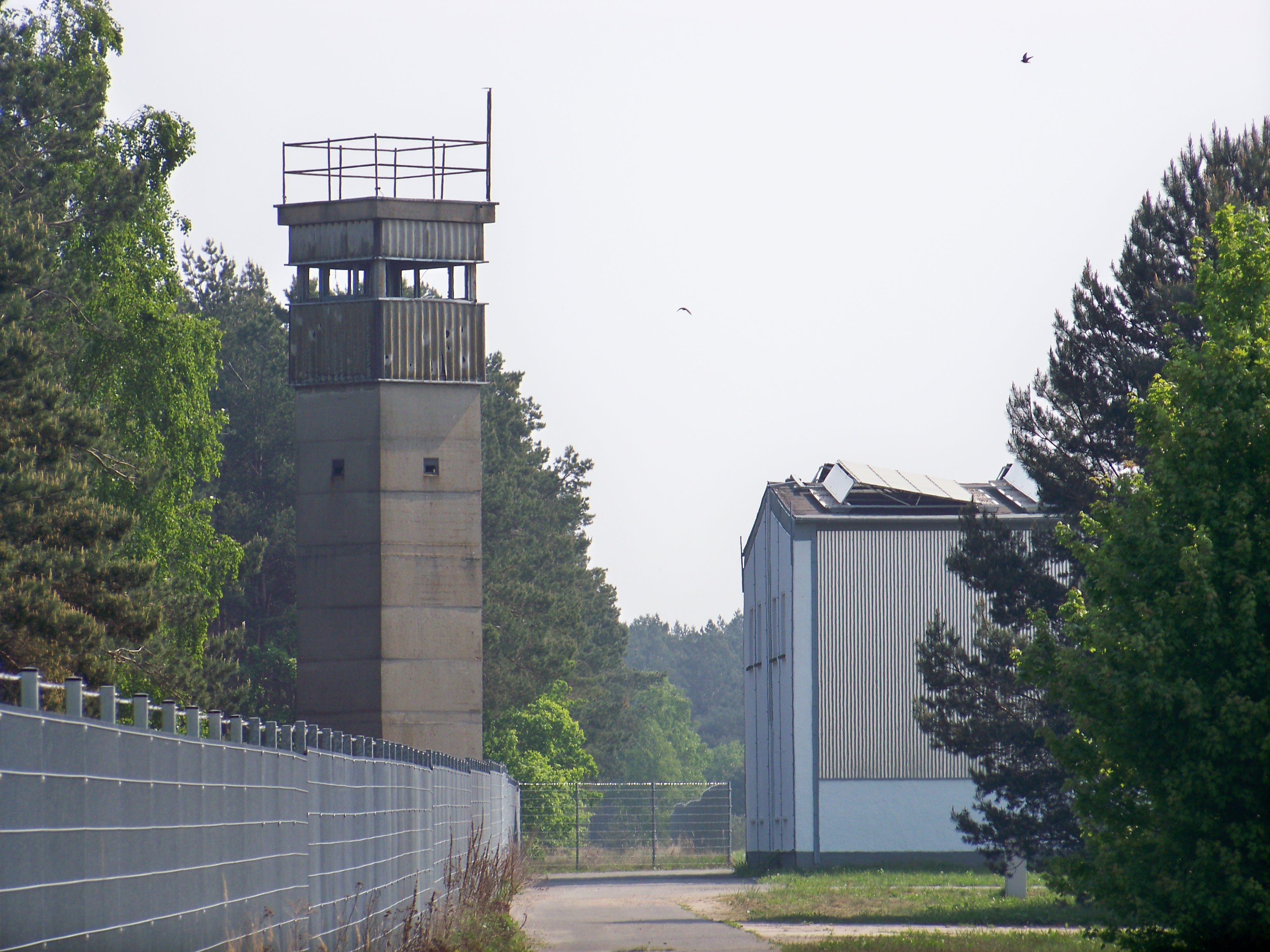 Wachturm und Hangar des ehemaligen Flugplatz Eilenburg